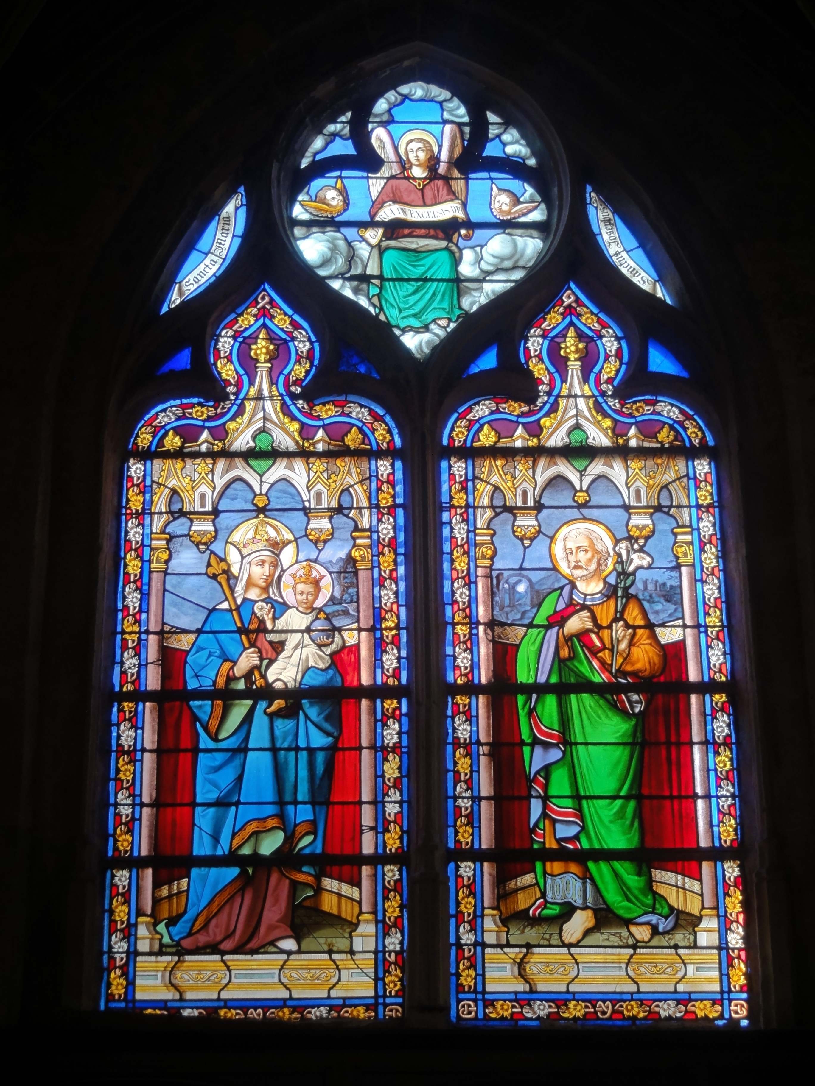 2e chapelle du sud, verrière n° 8 - Vierge à l'Enfant et saint Joseph.